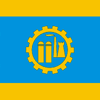 Прапор Краматорська